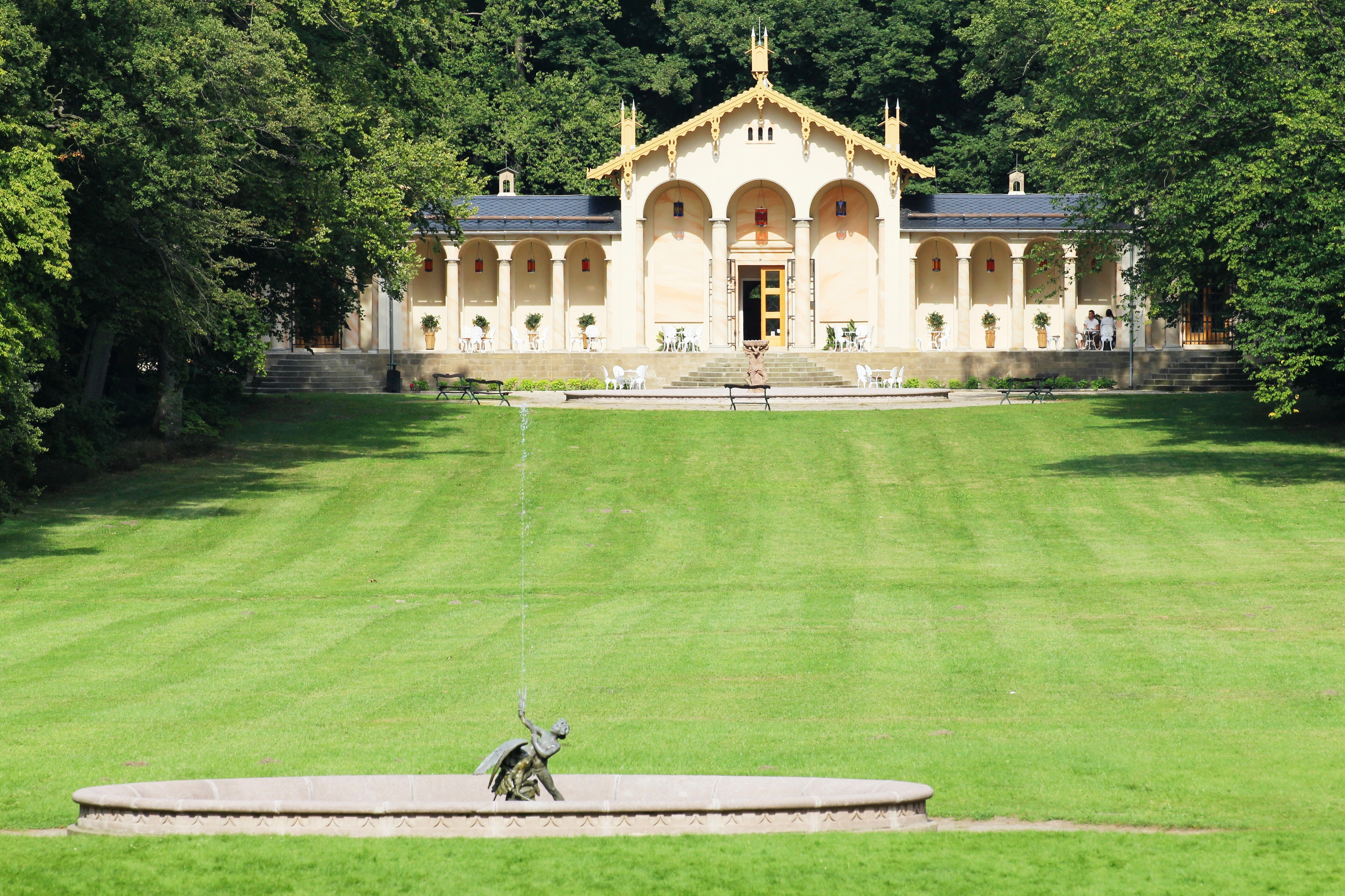 Oranžerie, zámecký park Sychrov